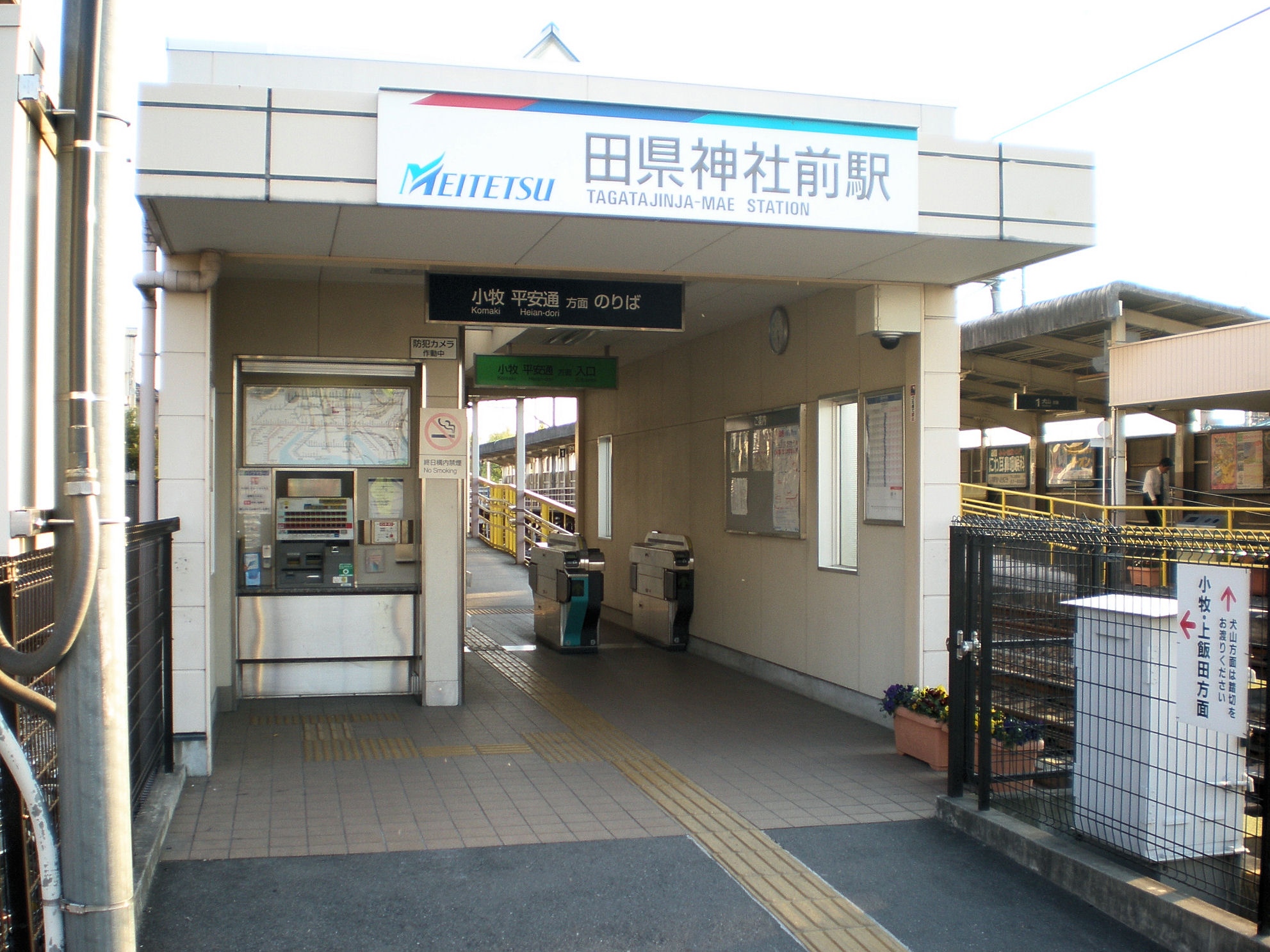 愛知県小牧市にある田県神社前駅